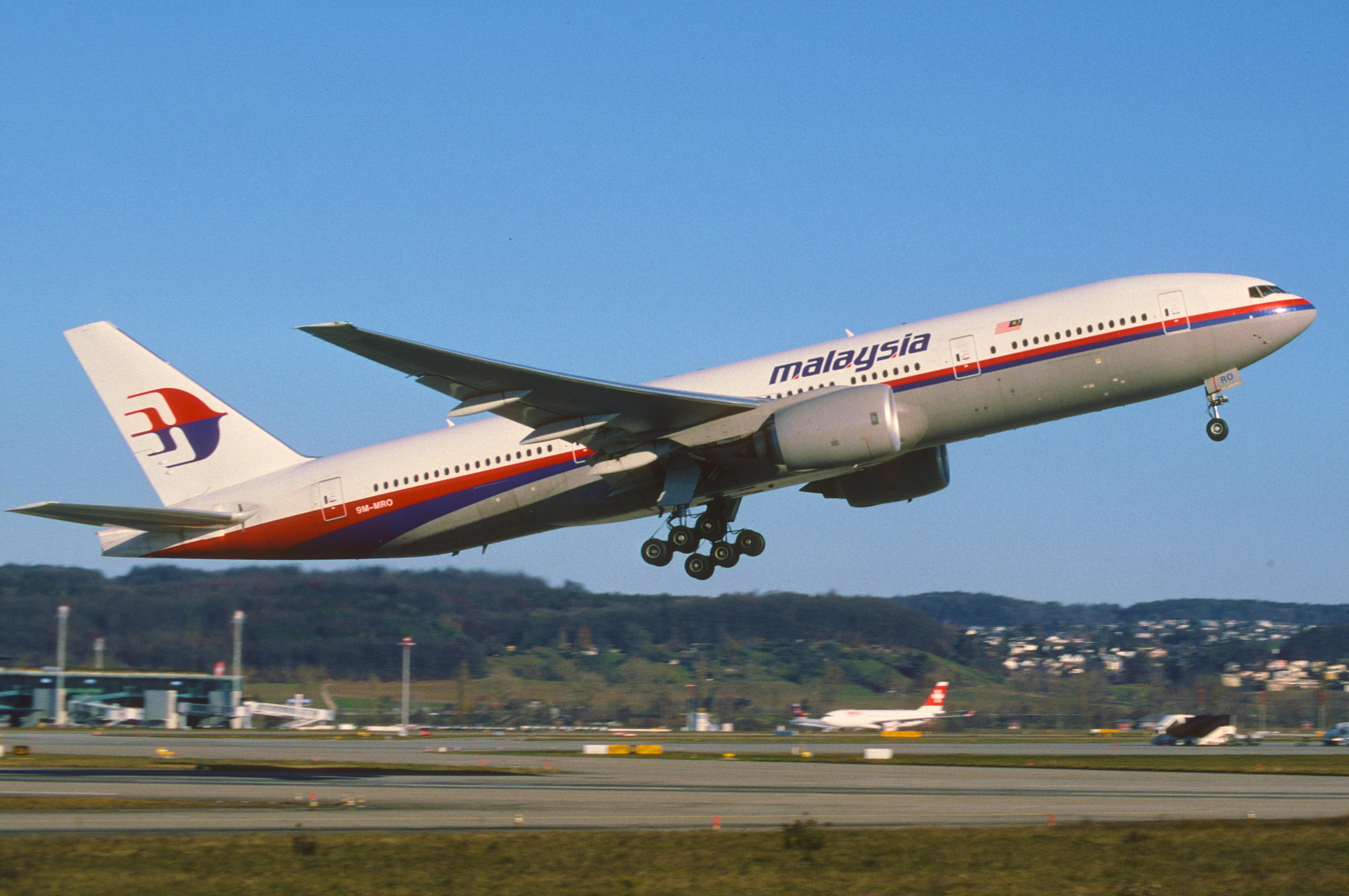 268ao - Malaysia Airlines Boeing 777-2H6ER; 9M-MRO@ZRH;07.12.2003